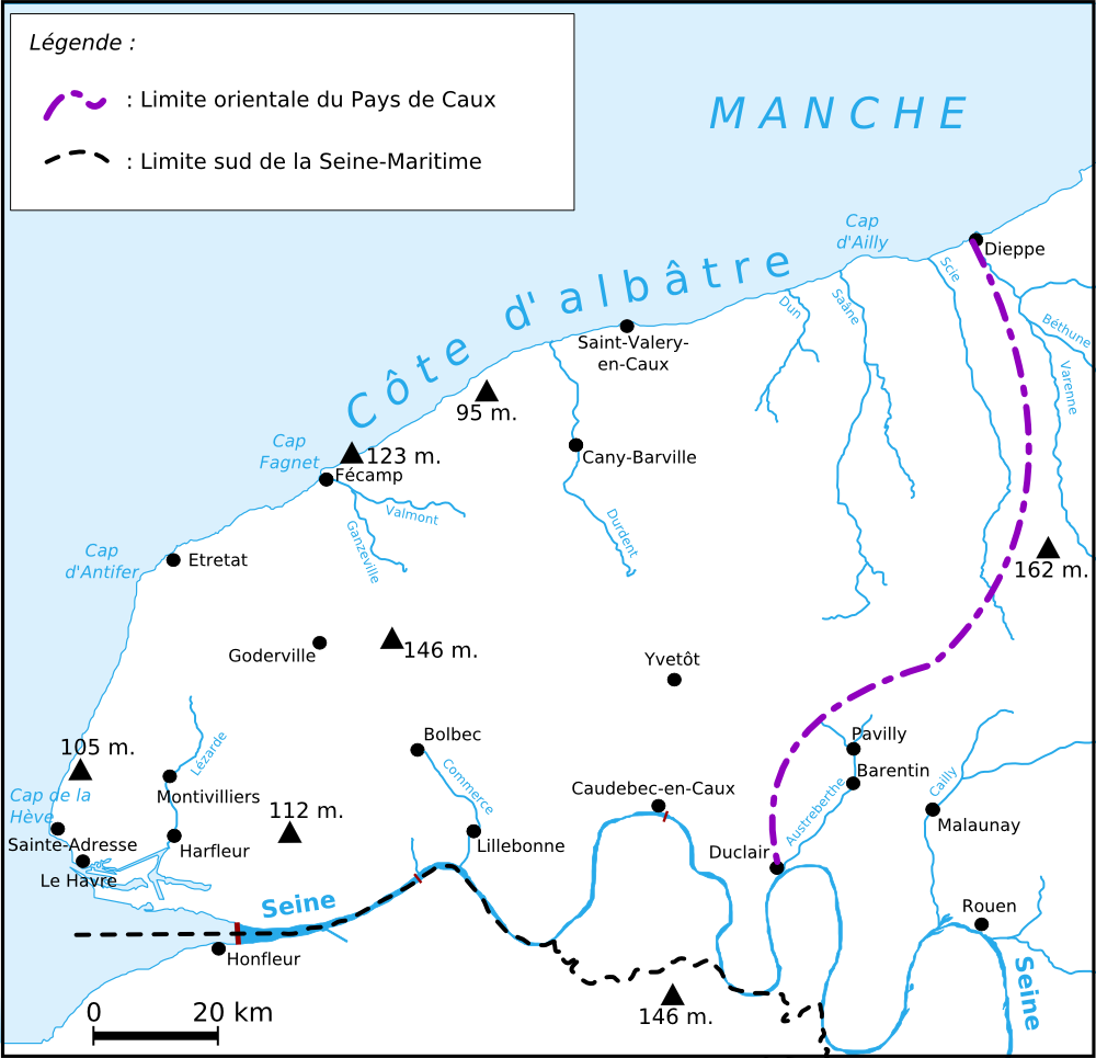 Carte du Pays de Caux, Seine-Maritime, France